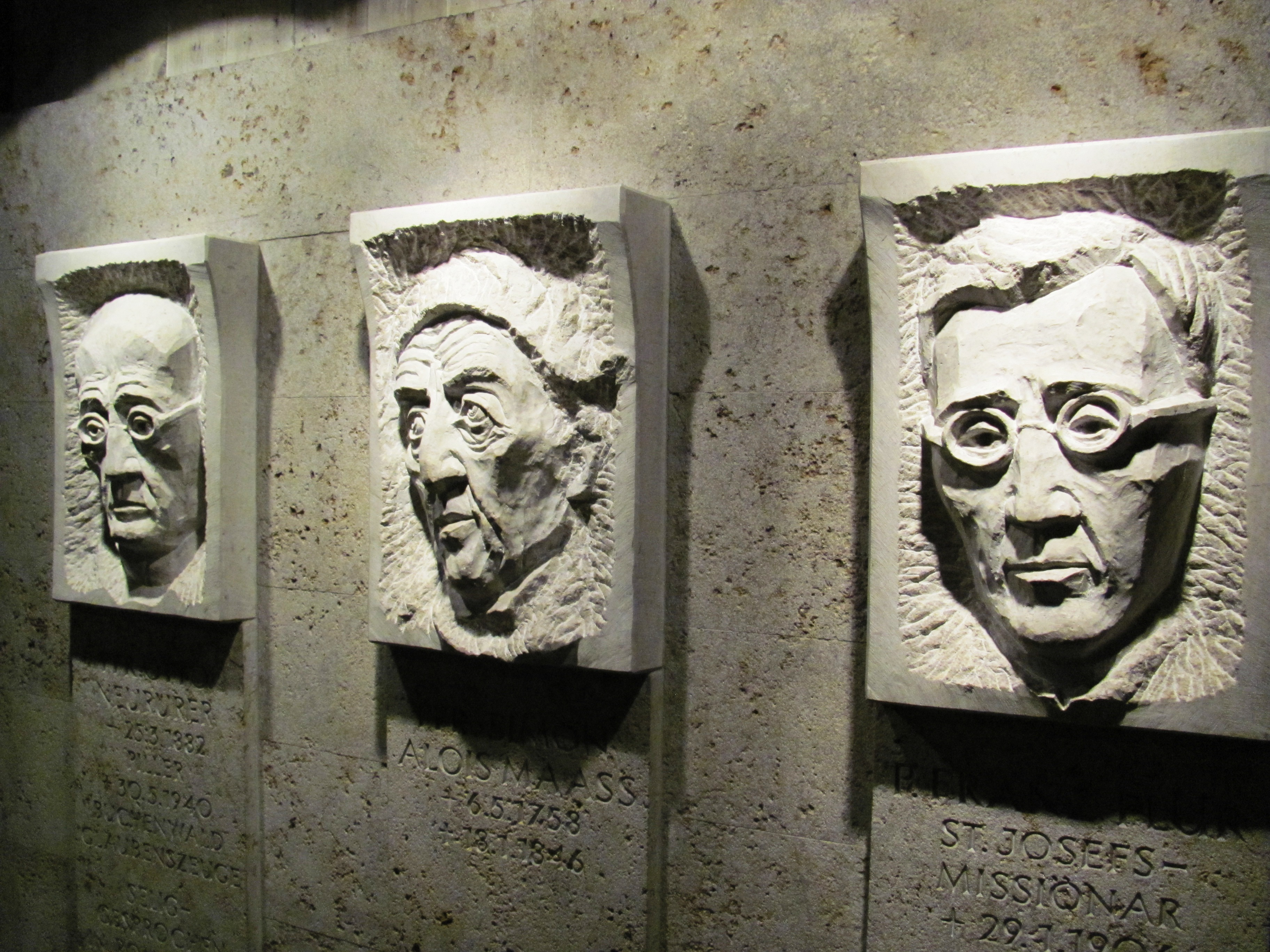 Die vom Tiroler Bildhauer gestaltete Gedenkstätte für Pfarrer Simon Alois Maaß und die Fließer Märtyrer, dem seligen Otto Neururer und Franz Flür, in der Krypta der Maria-Himmelfahrtskirche zu Fließ, Gemeinde Fliess